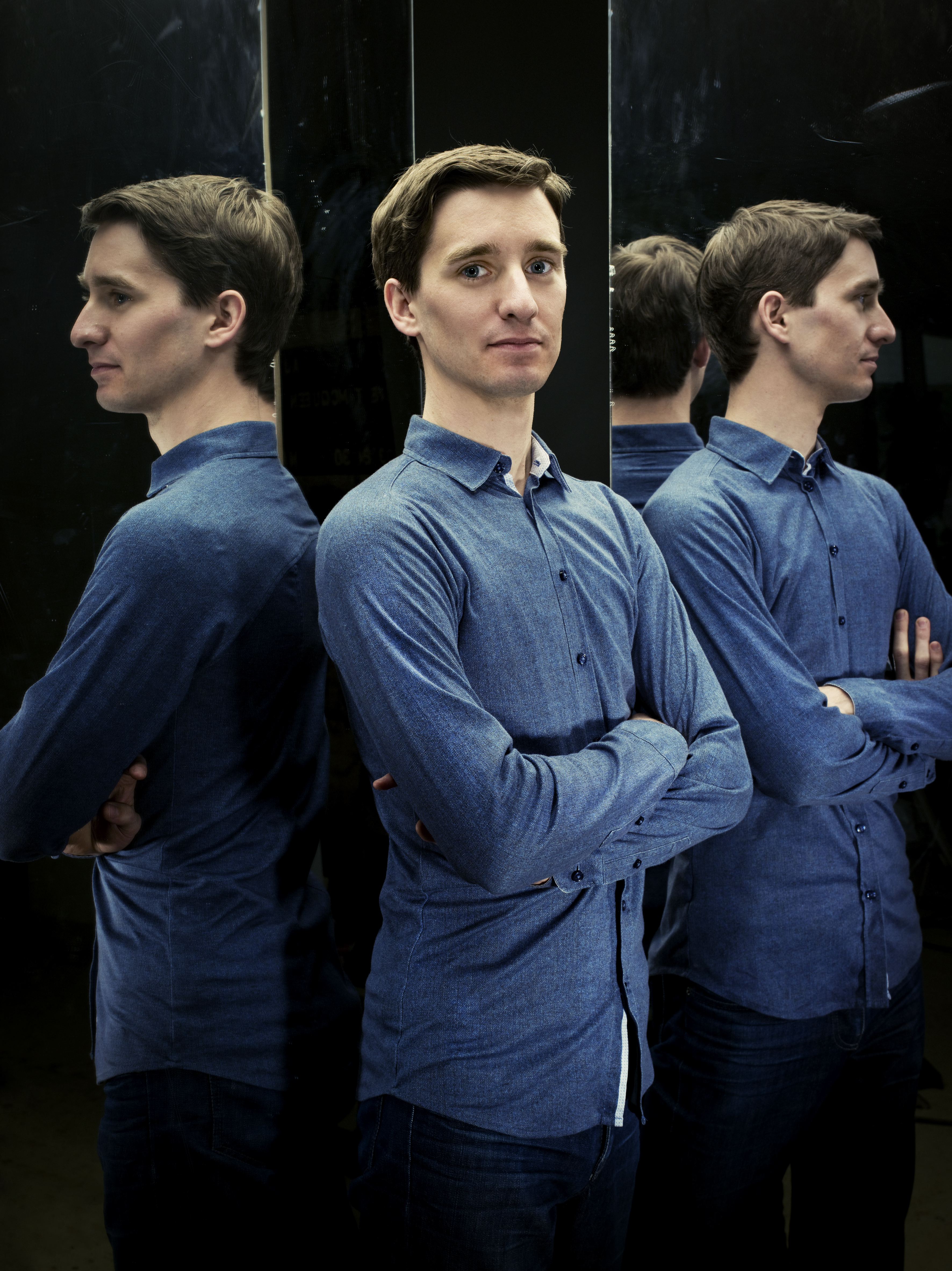 Foto: Moritz Schell